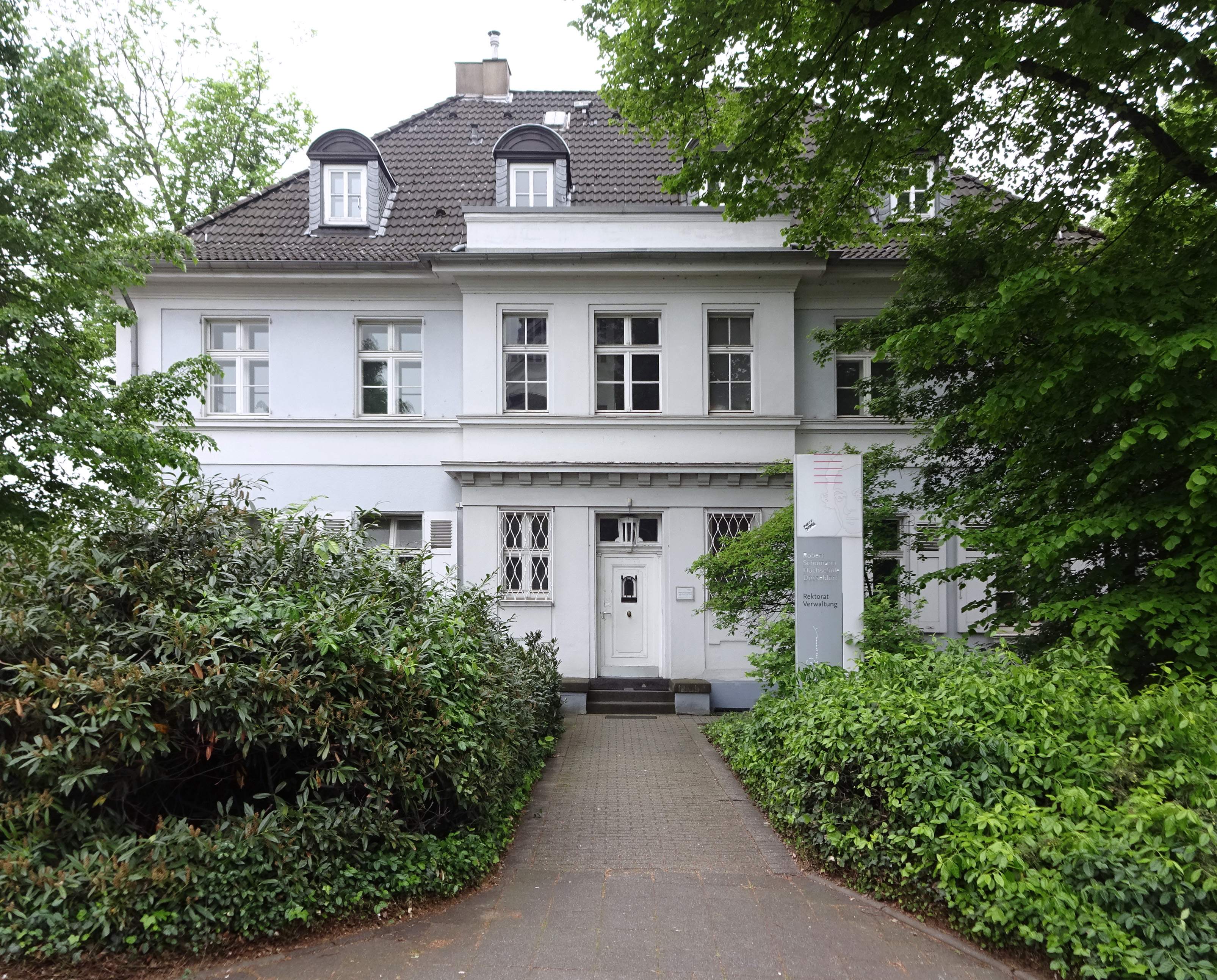 Villa Engelhardt, Robert Schumann Hochschule, Rektorat VerwaltungFischerstraße 110, Düsseldorf-Golzheim